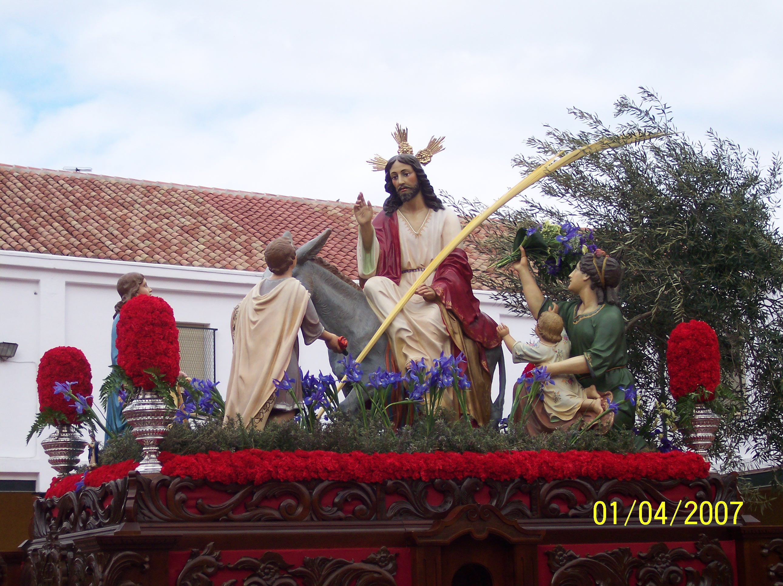 Cofradia de Jesus en su entrada a Jerusalen (martos)